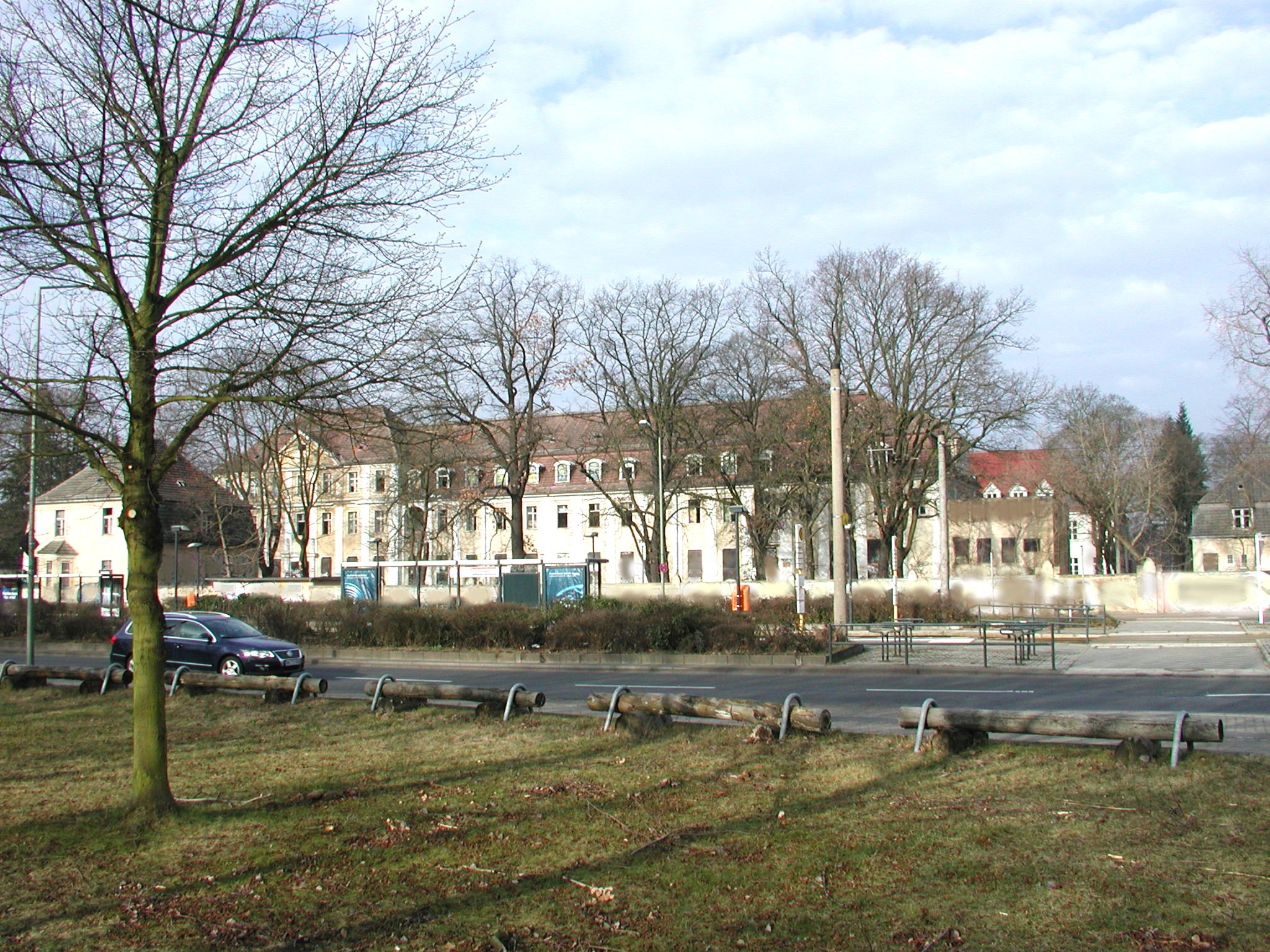 eh. Diakonie (3)